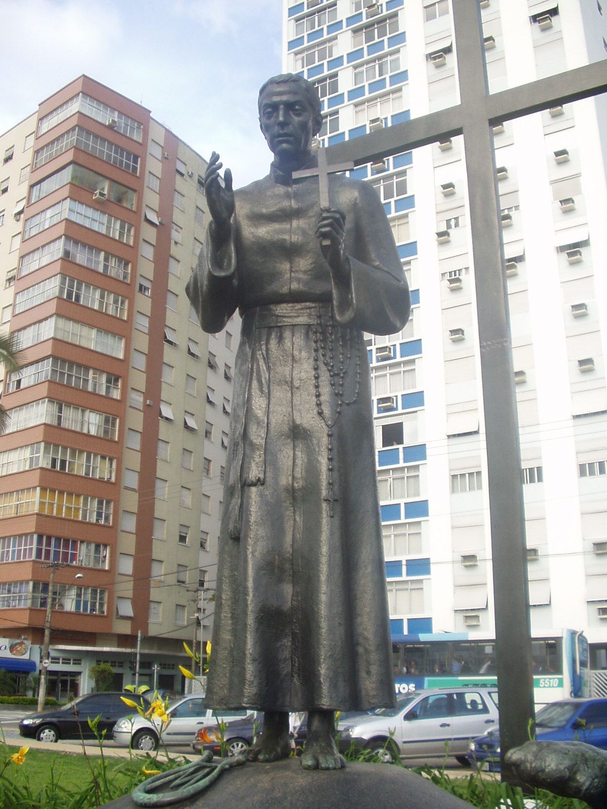 Estátua de José de Anchieta em Santos.